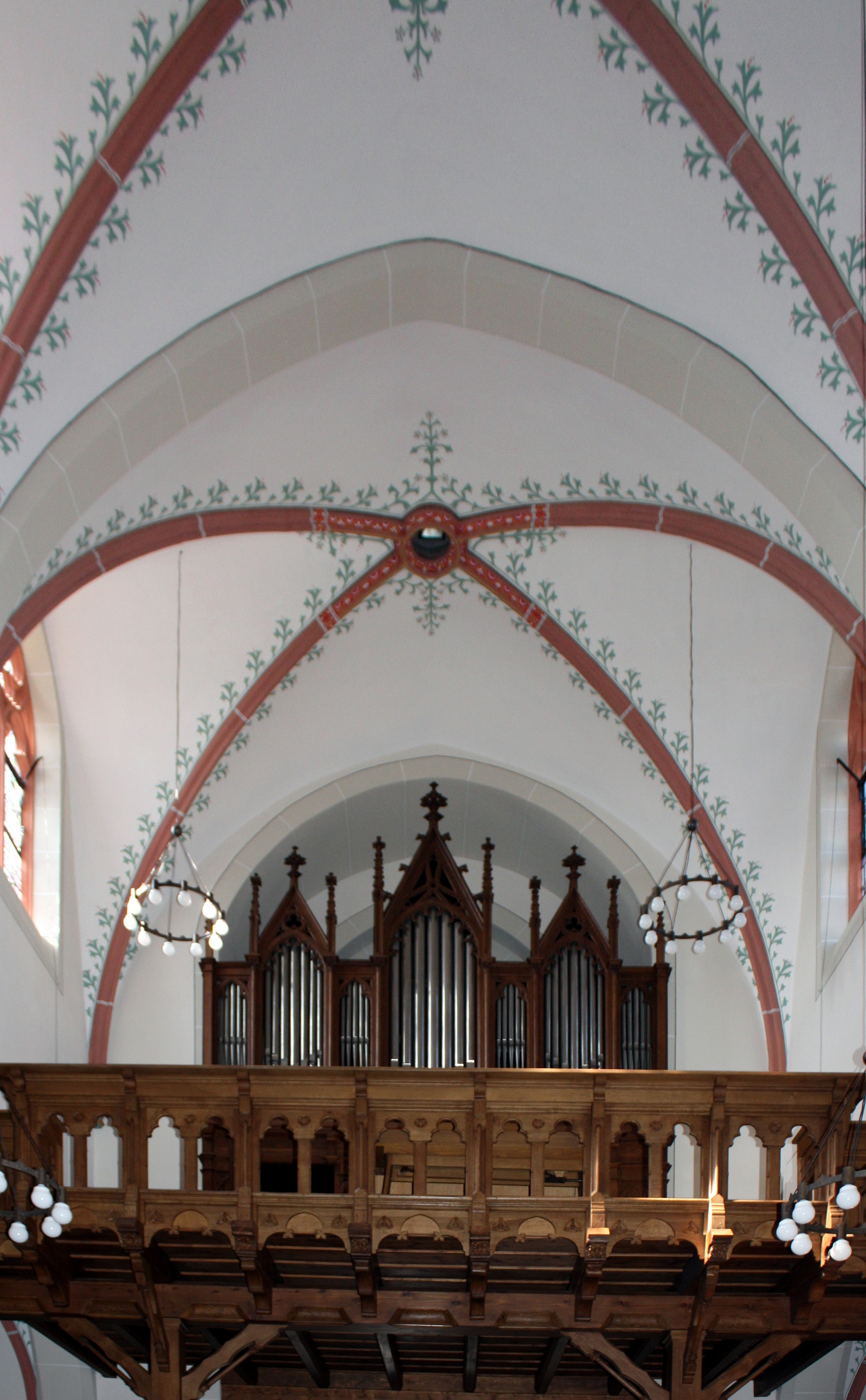 Friesheim, Pfarrkirche St. Martin. Orgel der Firma Johannes Klais aus dem Jahr 1896